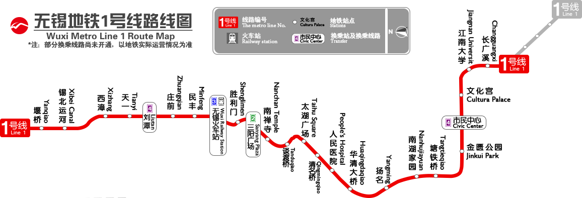 无锡地铁1号线按地形绘制地图